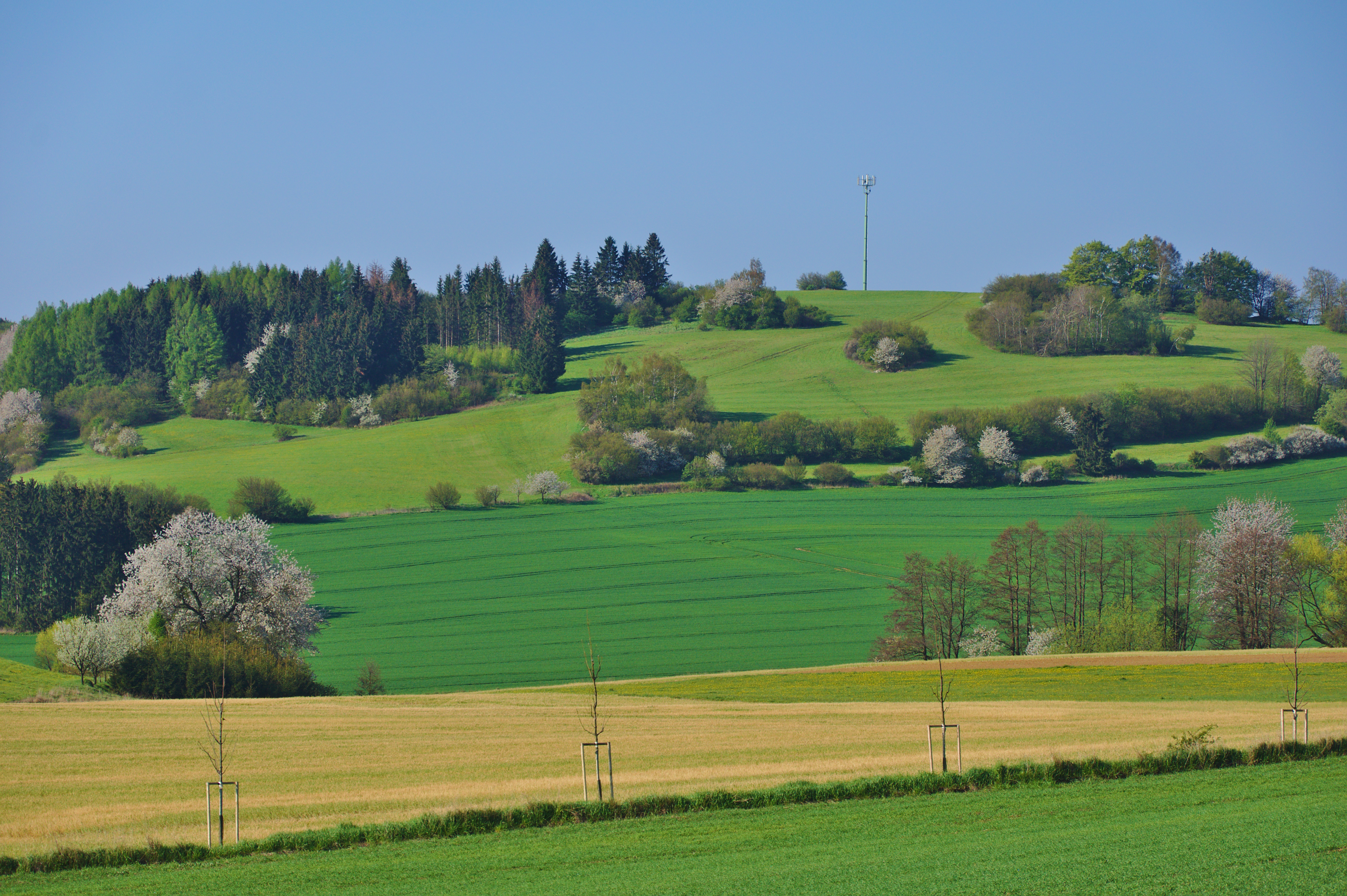 Kopec Vrchy, Prosetín, okres Žďár nad Sázavou